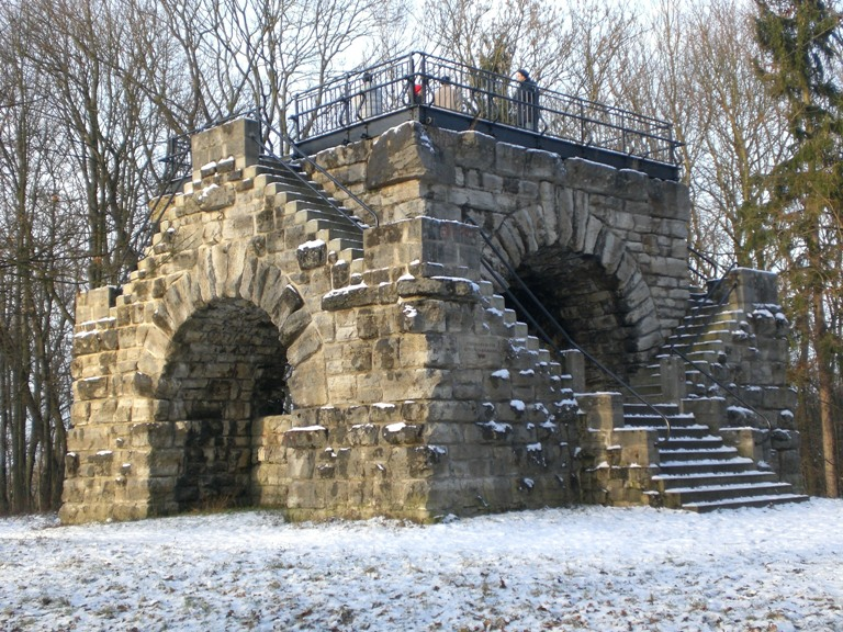 Bismarckstein in Göttingen, Gedenkstätte zu Ehren des ehemaligen Reichskanzlers Otto von Bismarck, im Volksmund wegen seiner grotesken Form auch als Elefantenklo bekannt